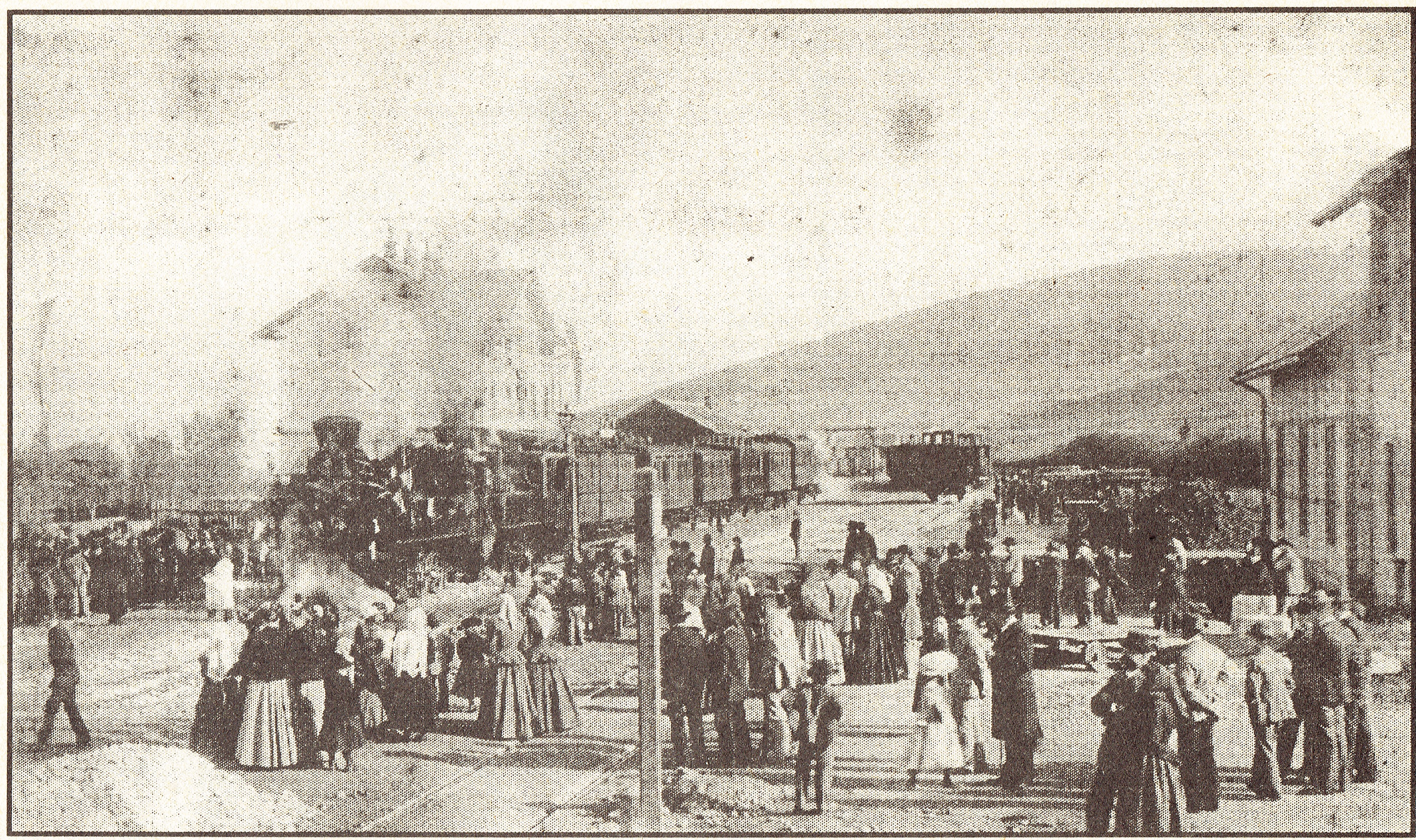 Příjezd slavnostního vlaku do Prachatic při zahájení provozu na trati Číčenice - Prachatice